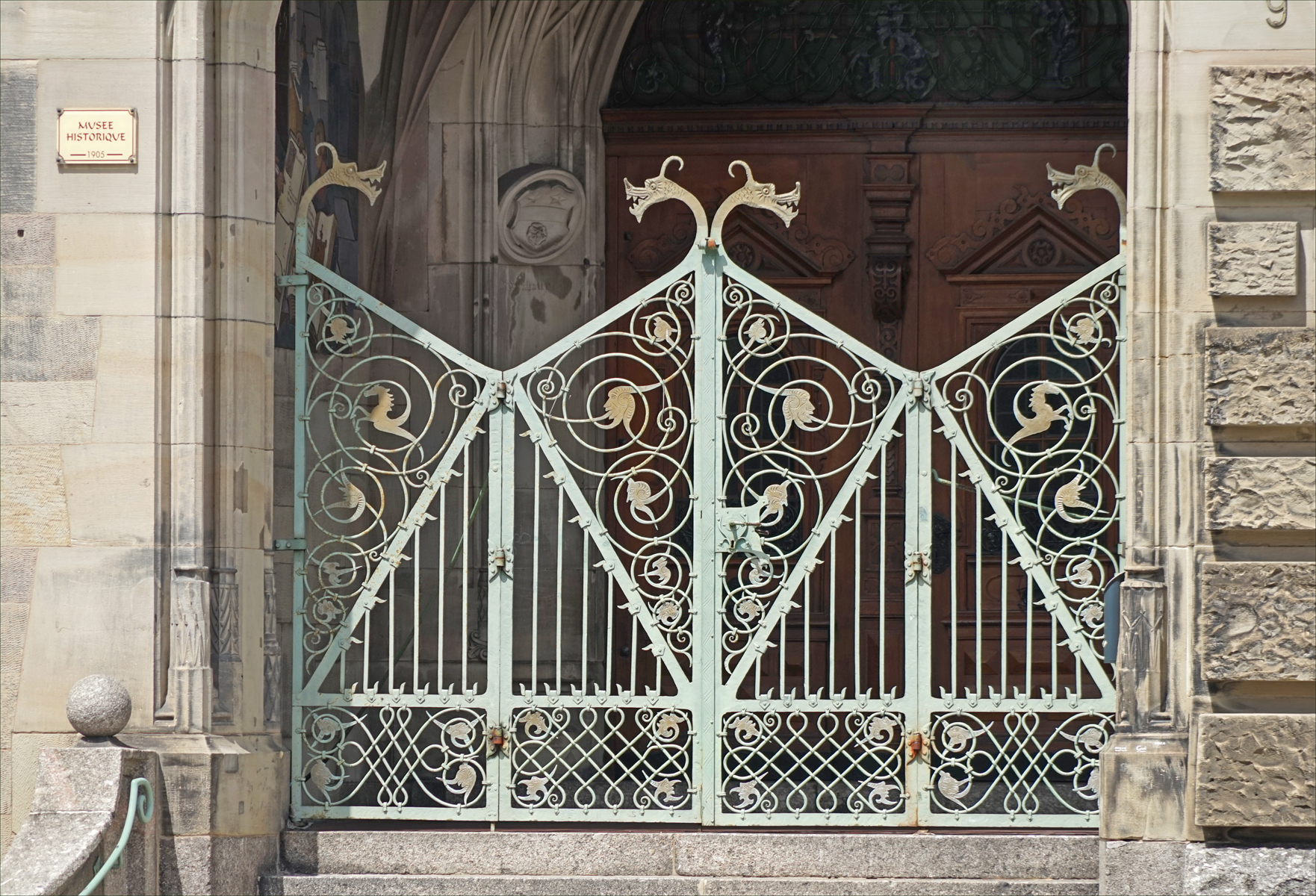 Grille d'entrée en fer forgé Musée historique de Haguenau Ce bâtiment de style néo-Renaissance allemande, teinté d'art nouveau, date de 1905, il a été conçu par les architectes Kuder et Müller de Strasbourg sous l'impulsion du maire de l'époque Xavier Nessel (1834-1905), archéologue et érudit.